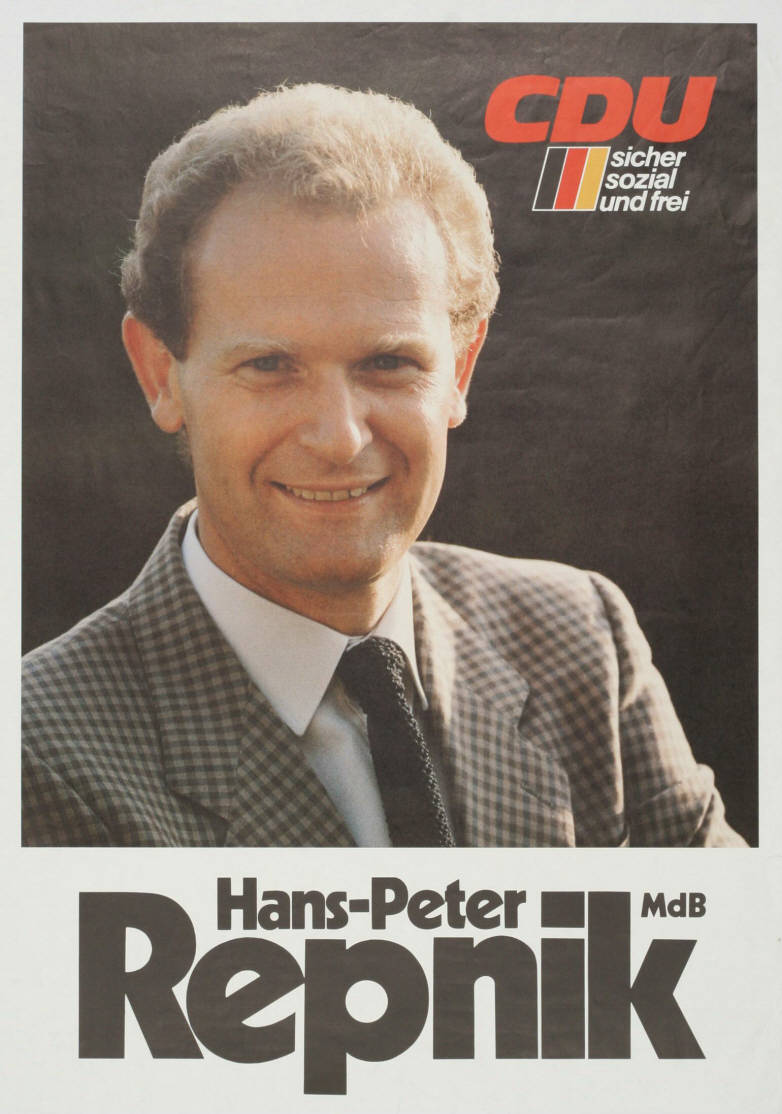 CDU sicher sozial und frei Hans-Peter Repnik MdB Abbildung: Porträtfoto Plakatart: Kandidaten-/Personenplakat mit Porträt Objekt-Signatur: 10-001: 2581 Bestand: Plakate zu Bundestagswahlen (10-001) GliederungBestand10-18: Plakate zu Bundestagswahlen (10-001) » Die 10. Bundestagswahl am 6. März 1983 » CDU » Mit Porträtfoto Lizenz: KAS/ACDP 10-001: 2581 CC-BY-SA 3.0 DE